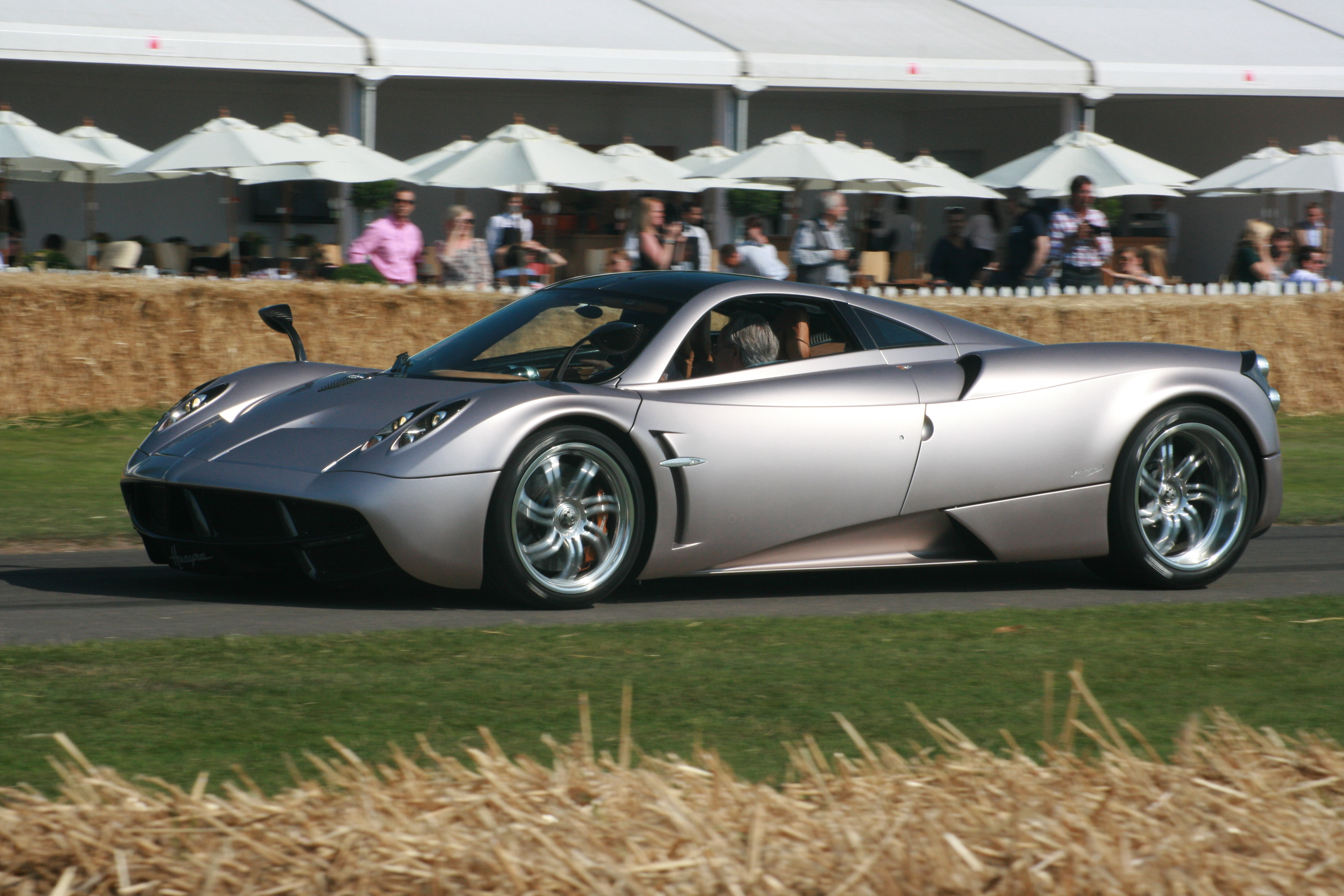 Pagani Huayra